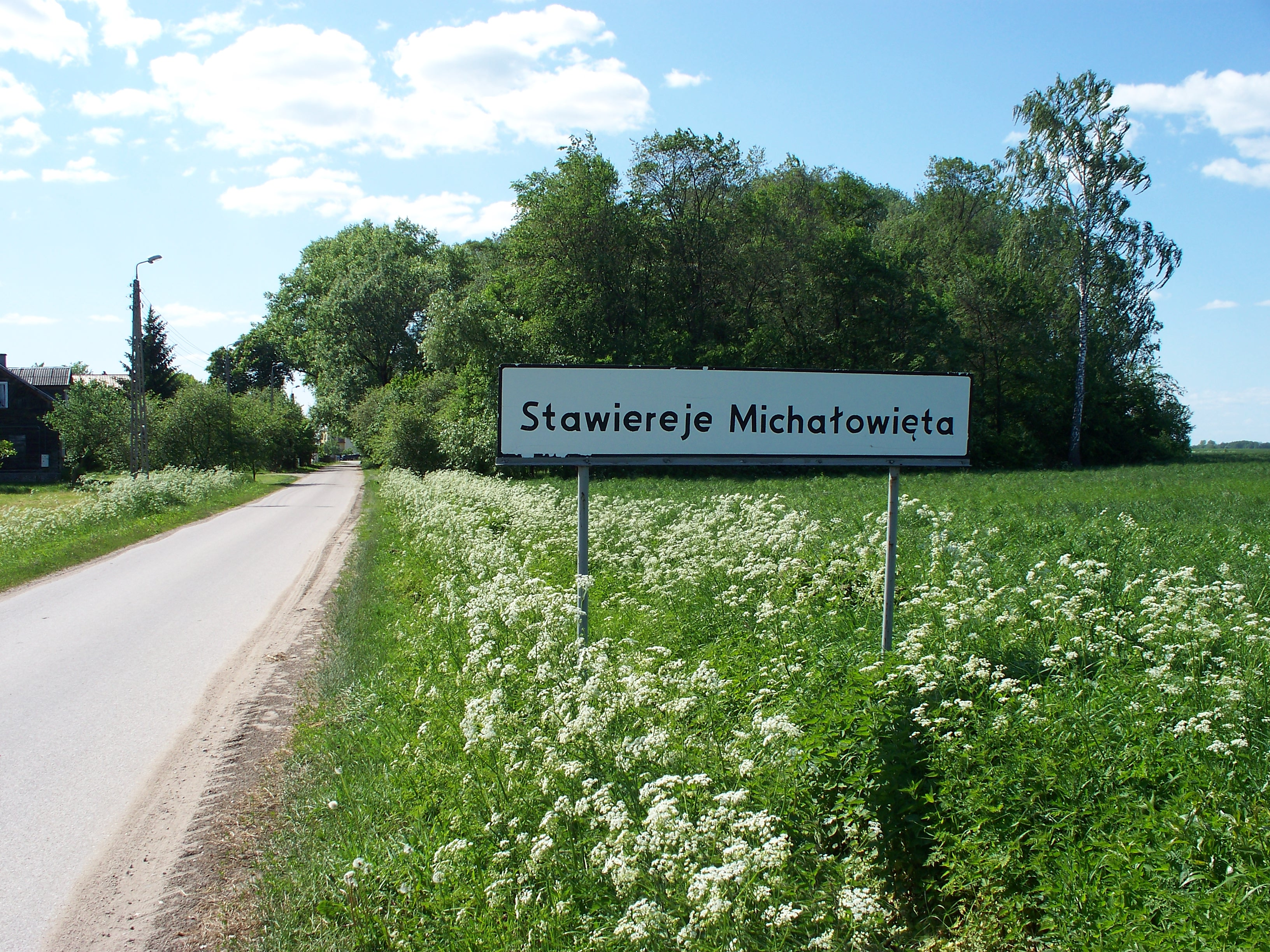 Miejscowość ta położona jest pomiędzy Stawierejami Podleśnymi a Moczydłami Stanisławowiętami.